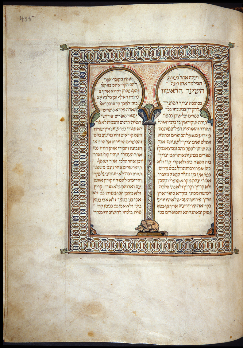 Bíblia de Cervera (fl 435)